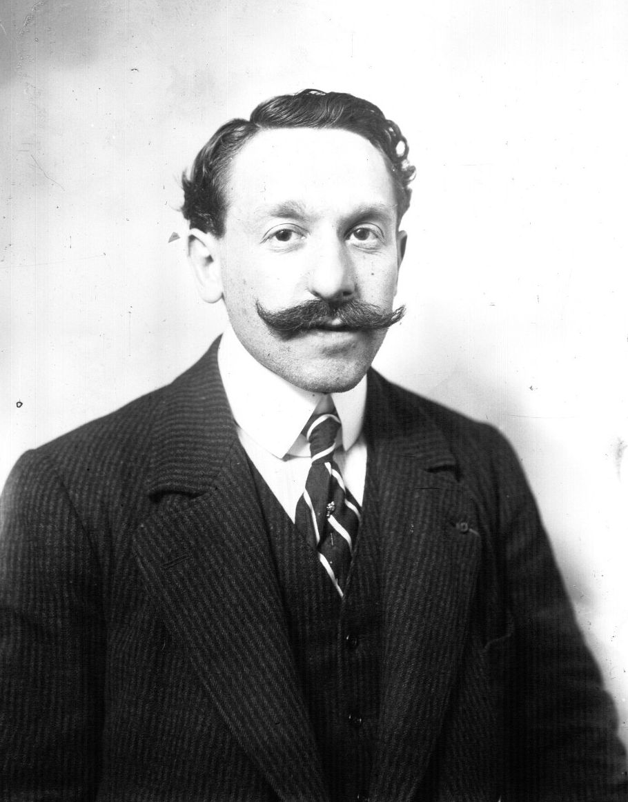 Mr Léon Sée, rédacteur en chef de "Boxe et Boxeurs"